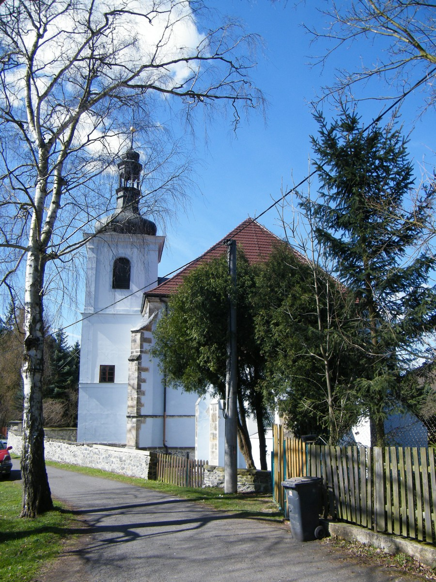 Kostel svaté Anny v Jedlce